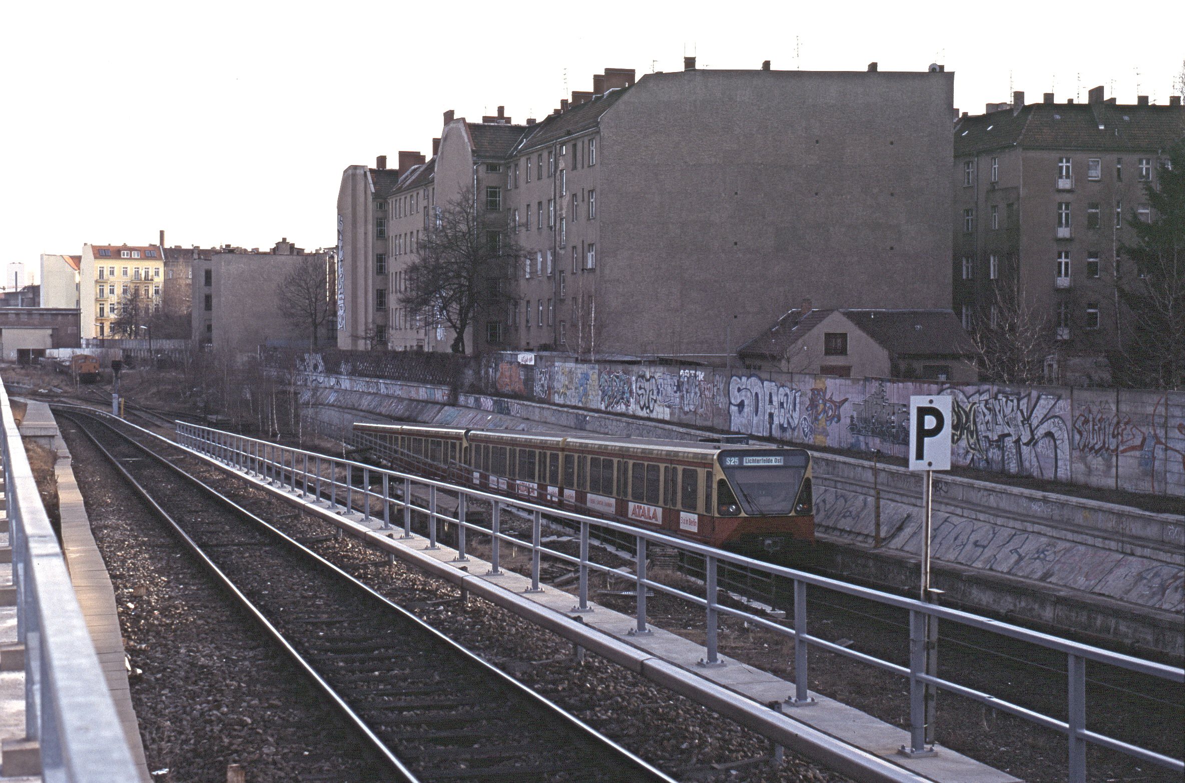 Zufahrtsrampe zum Nord-Süd-Tunnel, Berlin Nordbahnhof